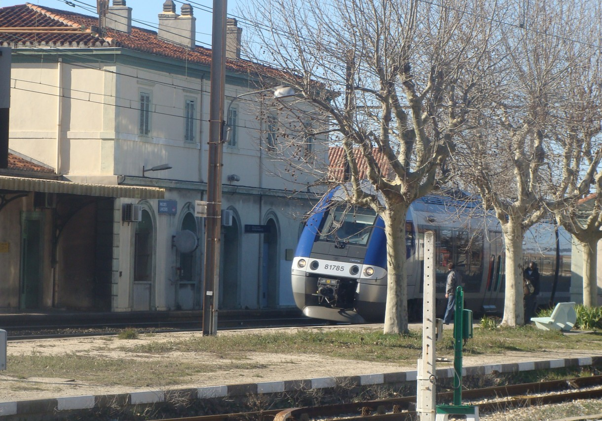 Un TER Avignon-Marseille marque l'arrêt en gare de Pas-des-Lanciers.